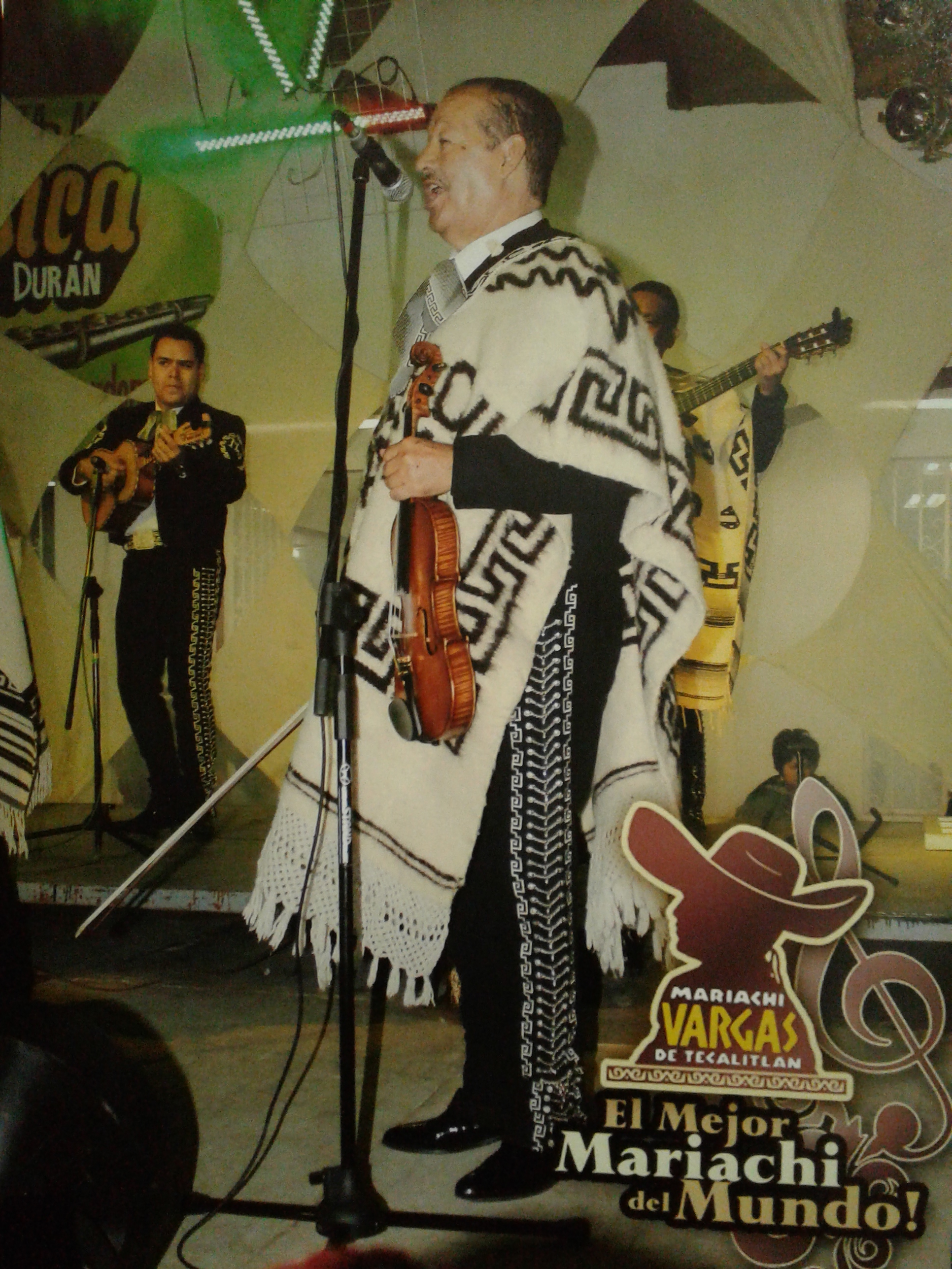 "Pepe" Martinez, como director musical del Mariachi Vargas, en 2013